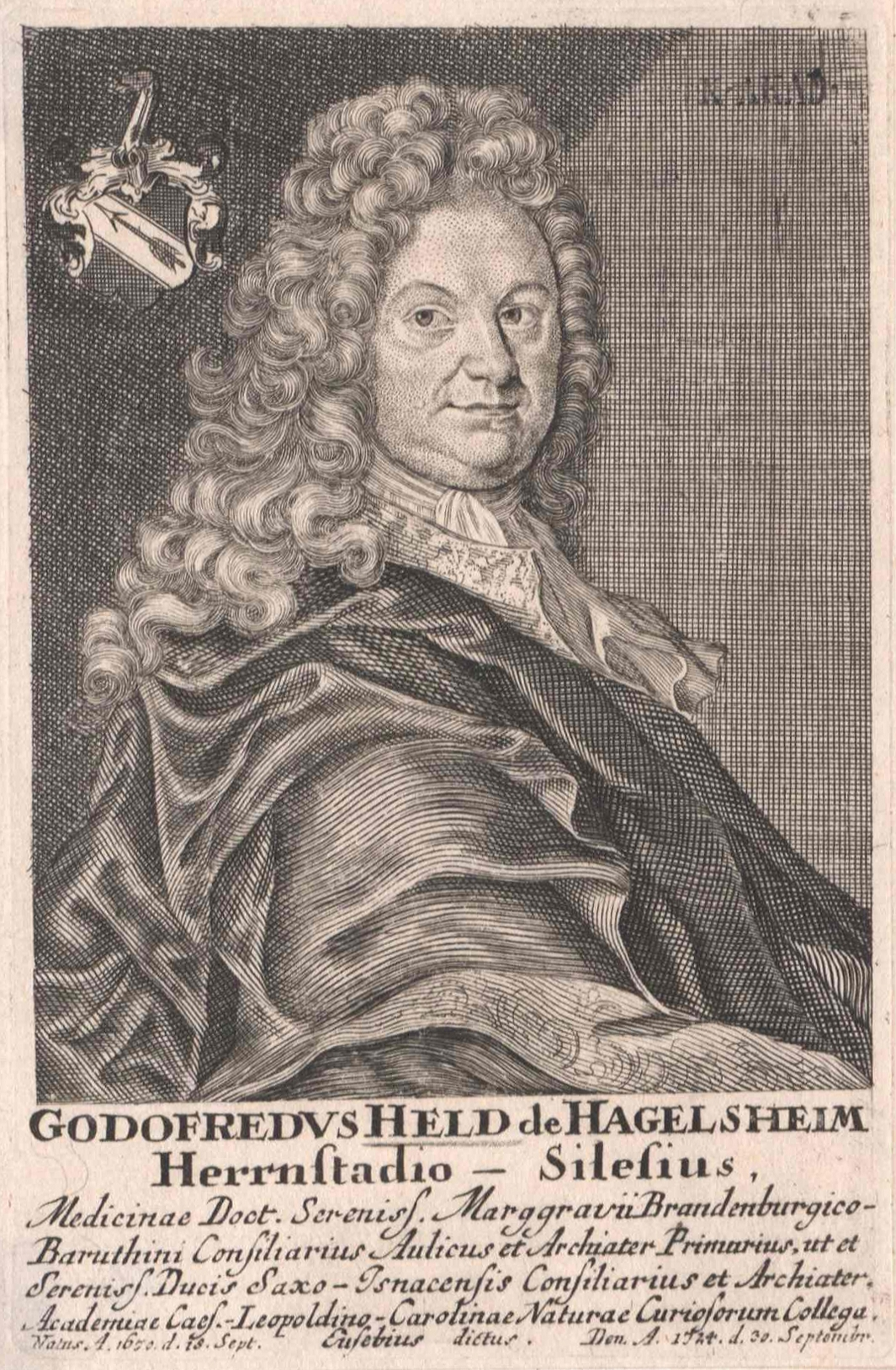 Portrait des Gottfried Held von Hagelsheim, geboren 18. September 1670 in Herrnstadt (Schlesien), gestorben 30. September 1724 in Bayreuth. Arzt. Studium in Jena, praktizierender Arzt in Coburg, 1712 herzoglich sachsen-eisenach. und 1715 markgräflich bayreuth. Hofrat und Leibarzt. 1714 Mitglied der Leopoldina. Beschreibung:Fast Halbfrontal nach rechts mit Umhang, in unterschiedlich dicht kreuzschraffiertem Rechteck, darin oben links Familien-Wappen Held von Hagelsheim. Unten 7zeilige lateinische Legende: „GODOFREDVS HELD de HAGELSHEIM Herrnstadio-Silesius, Medicinae Doct[or,] Sereniss[imi] Marggravii Brandenburgico- Baruthini Consiliarius Aulicus et Archiater Primarius, ut et Sereniss[imi] Ducis Saxo-Isnacensis Consiliarius et Archiater, Academiae Caes[areae]-Leopoldino-Carolinae Naturae Curiosorum Collega, Eusebius dictus. Natus A. 1670. d[ie] 18. Sept. / Den[atus] A. 174. d[ie] 30. Sept.“